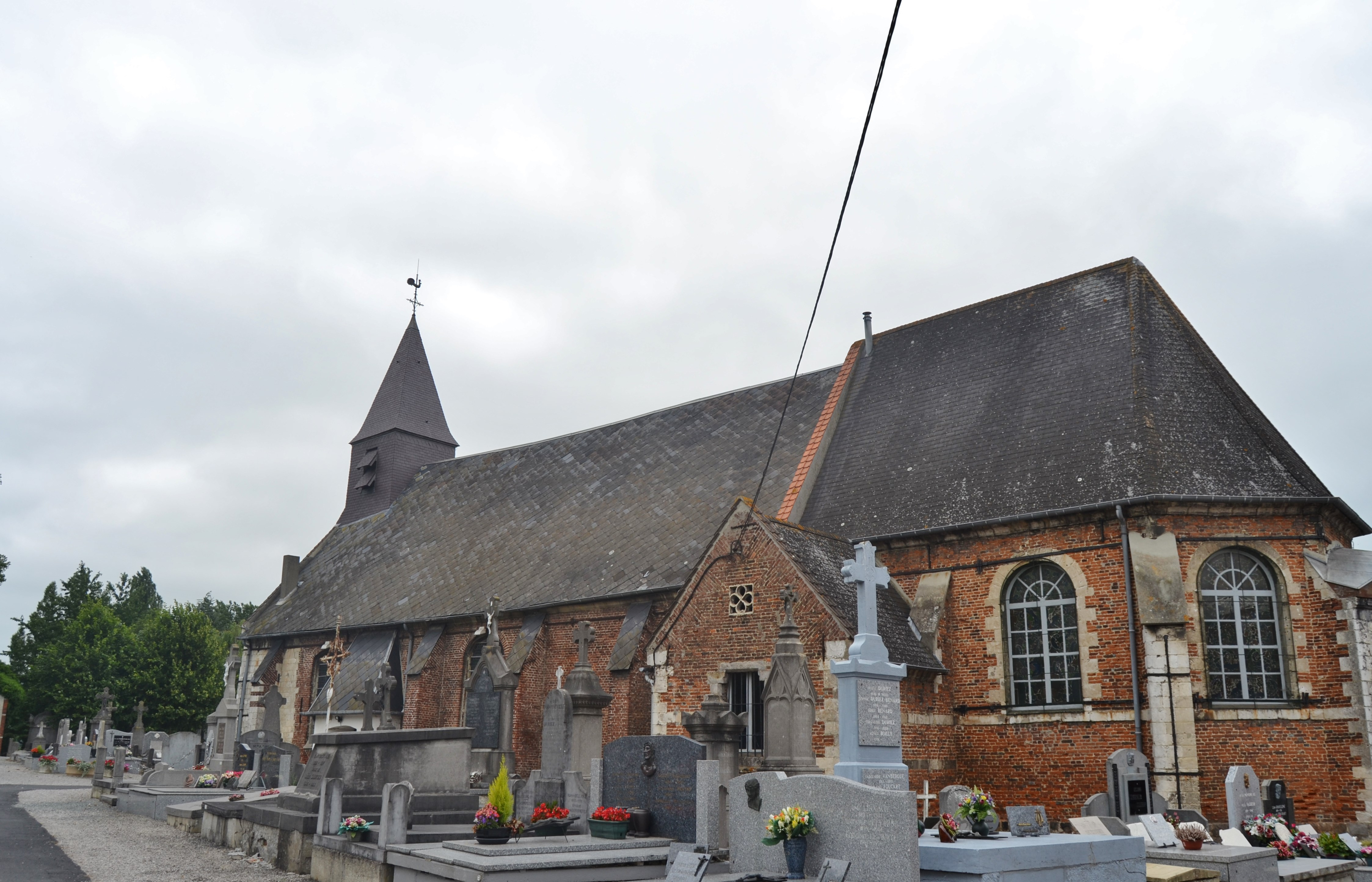 église St Nicaise